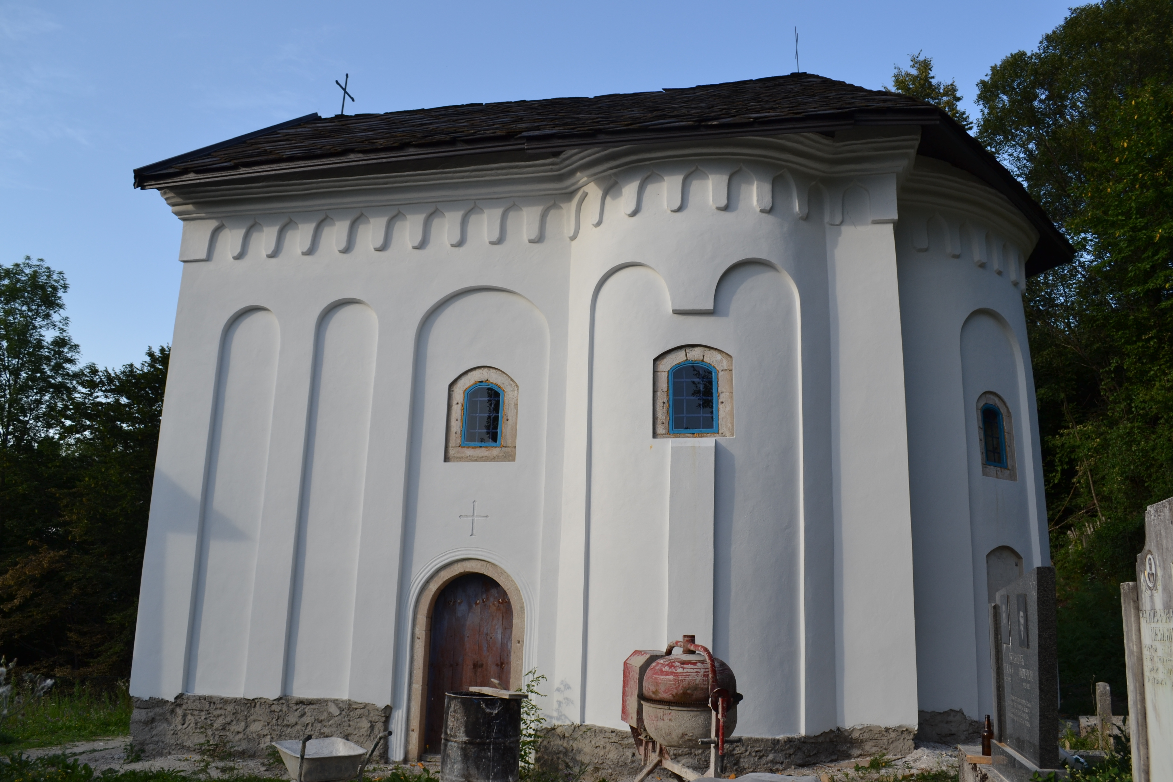 Crkva Sv. Save Srpskog u Milandži (opština Ivanjica)